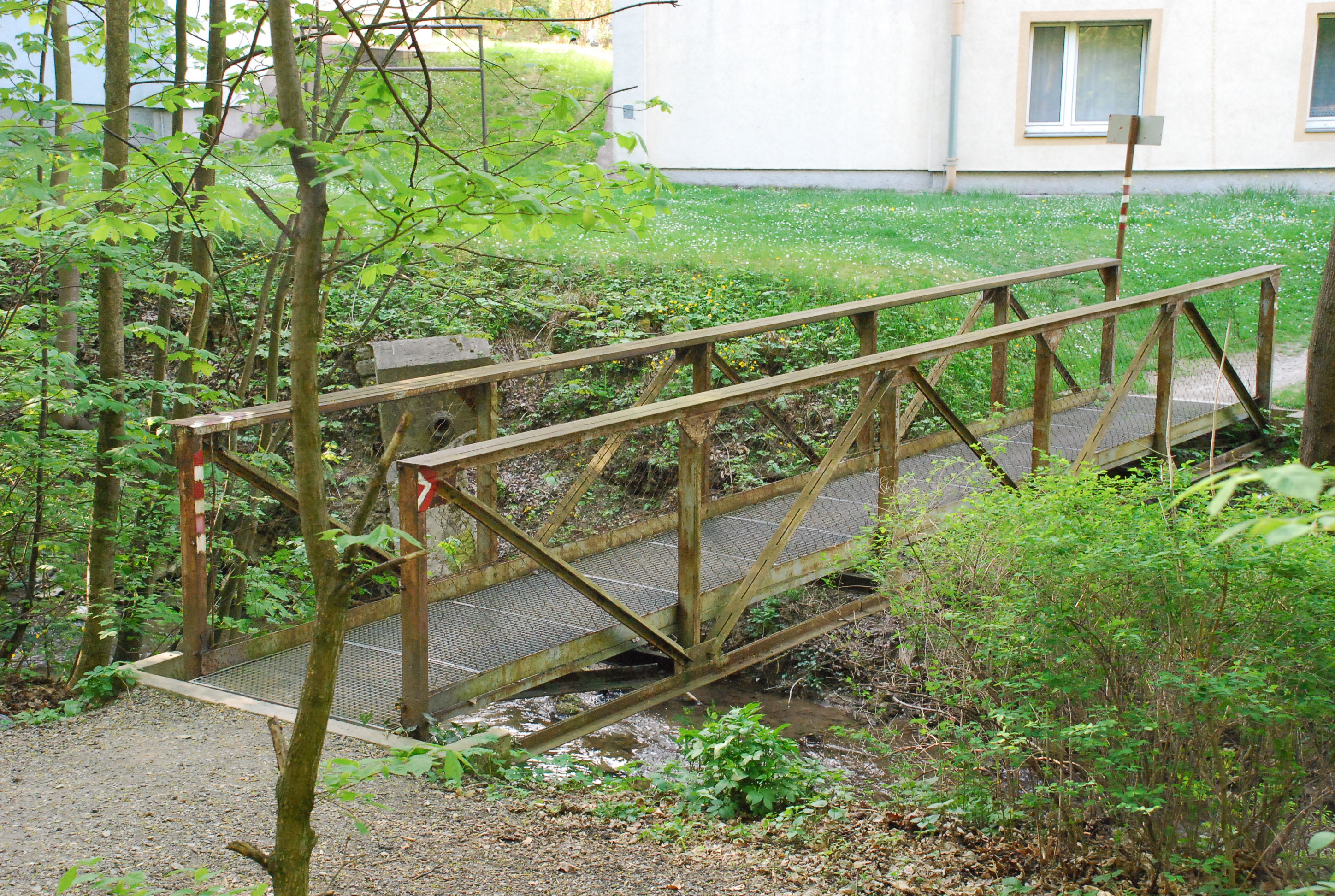 Brücke über den Kaltenleutgebener Bach am Weg zur ehemaligen Prießnitzquelle und über die Kaltenleutgebner Bahntrasse